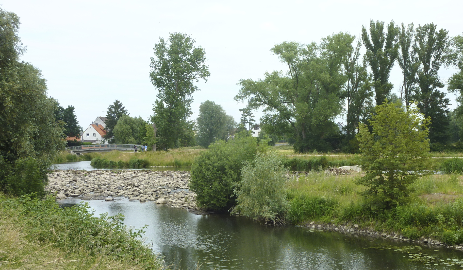 Verlauf des Flusses Nidda in Frankfurt am Main: Das Wehr Höchst war in den 1920er-Jahren zur Flussregulierung erbaut worden als das letzte Flusswehr vor dessen Mündung in den Main. Das Wehr wurde im Jahr 2013 größtenteils abgerissen, um eine Renaturierung des Flusses an dieser Stelle und damit Fischwanderungen flussaufwärts zu ermöglichen. Die Staustufe wurde durch eine rauhe Rampe ersetzt, das Wehrhaus am rechten Ufer blieb erhalten. Die zwischen den Stadtteilen Frankfurt-Höchst und Frankfurt-Nied über das Wehr führende Fußgängerüberquerung des Flusses wurde durch den Neubau einer Fußgängerbrücke wenige Dutzend Meter weiter flussaufwärts ersetzt. Das Foto zeigt die Flussrampe sowie im Hintergrund die neue Brücke und Wohnhäuser am Höchster Ufer. Blick flussaufwärts nach Nordosten